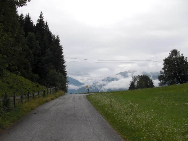 Kerschbaumer Sattel (Tirol): Passhöhe, Blick Richtung Süden